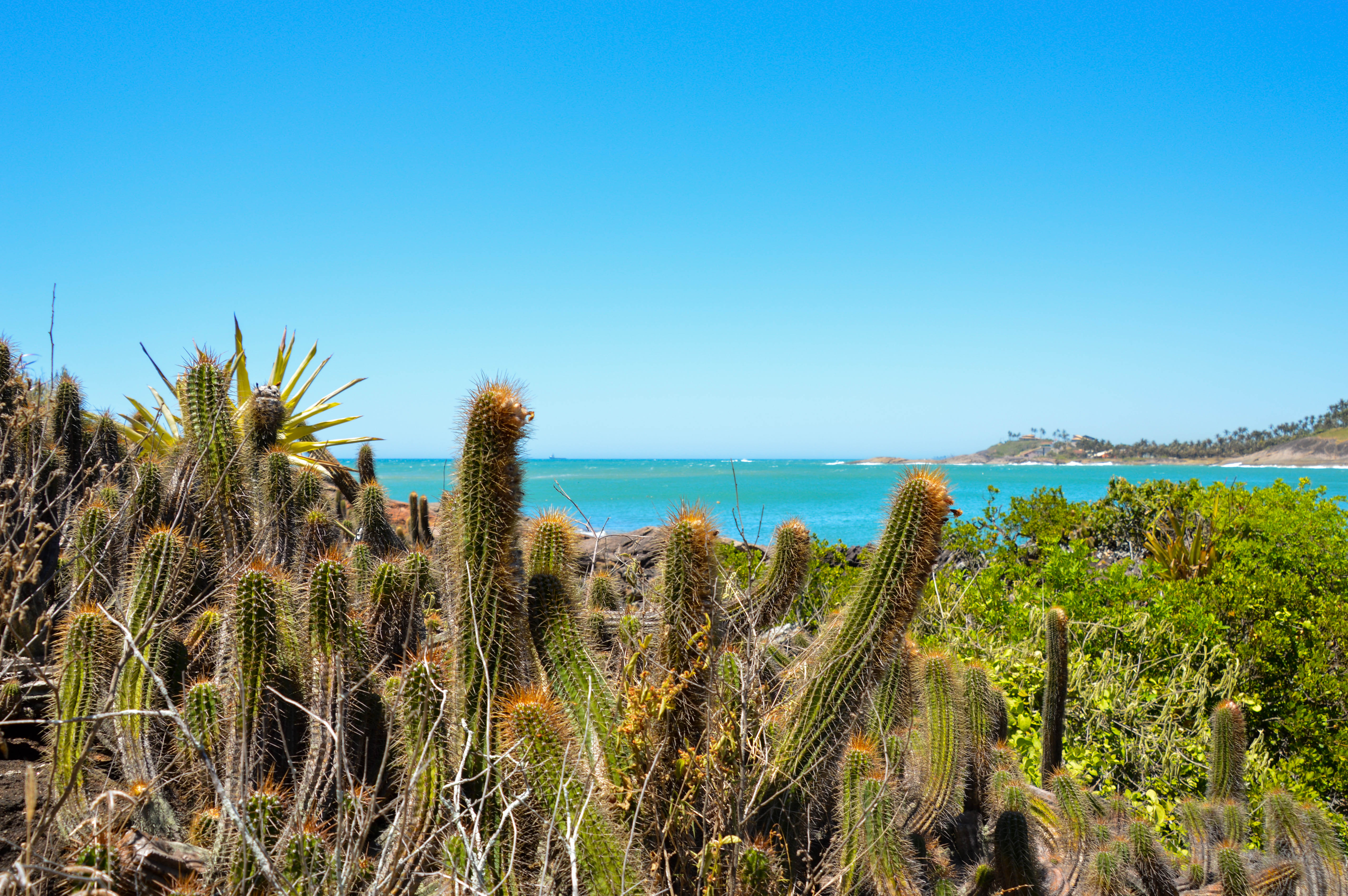 Restinga Guarapari